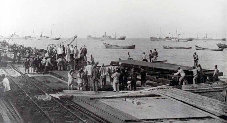 Historical images of Haifa תמונות היסטוריות של חיפה פריקת מטענים במזח / רציף בחיפה עוד לפני הקמת הנמל . צילום משנת 1903